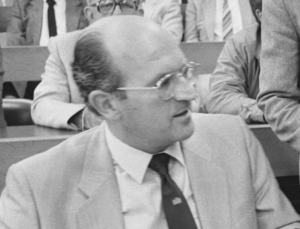 Tweede Kamer , hoorzitting vaste kamercommissie EZ inzake voormalig kartonfabriek OKTO; vlnr burgemeester Koek van Winschoten